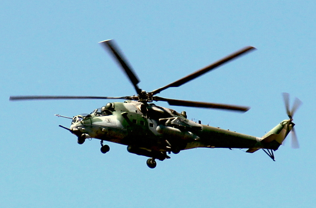 2°/8° GAv Força Aérea Brasileira